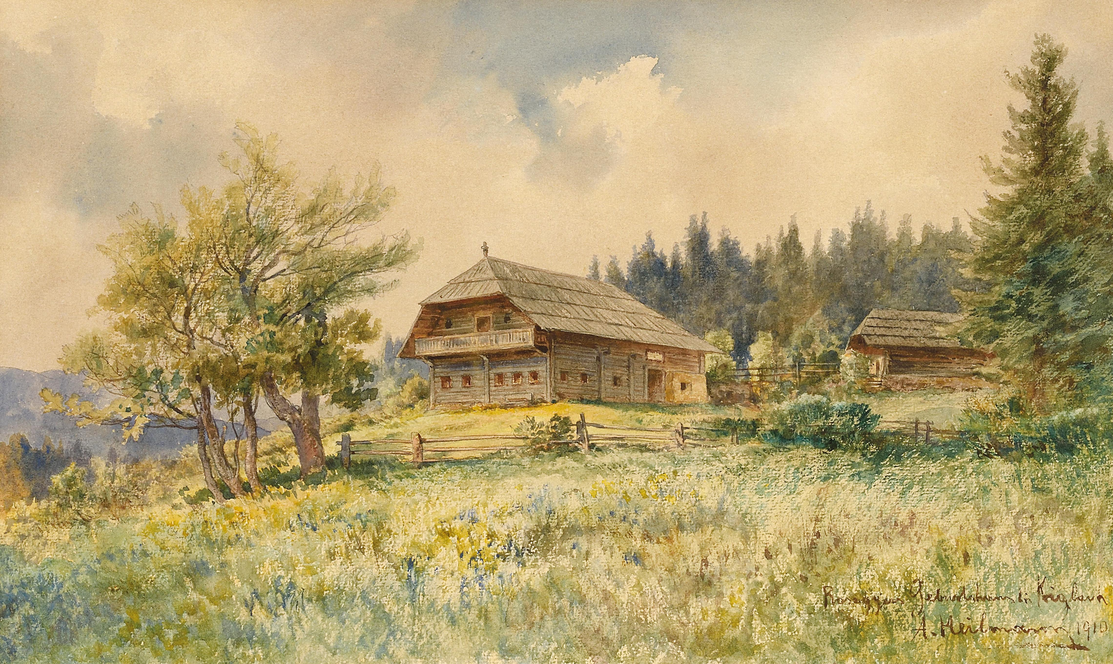 Peter Roseggers Geburtshaus in Krieglach, Aquarell von Anton Paul Heilmann